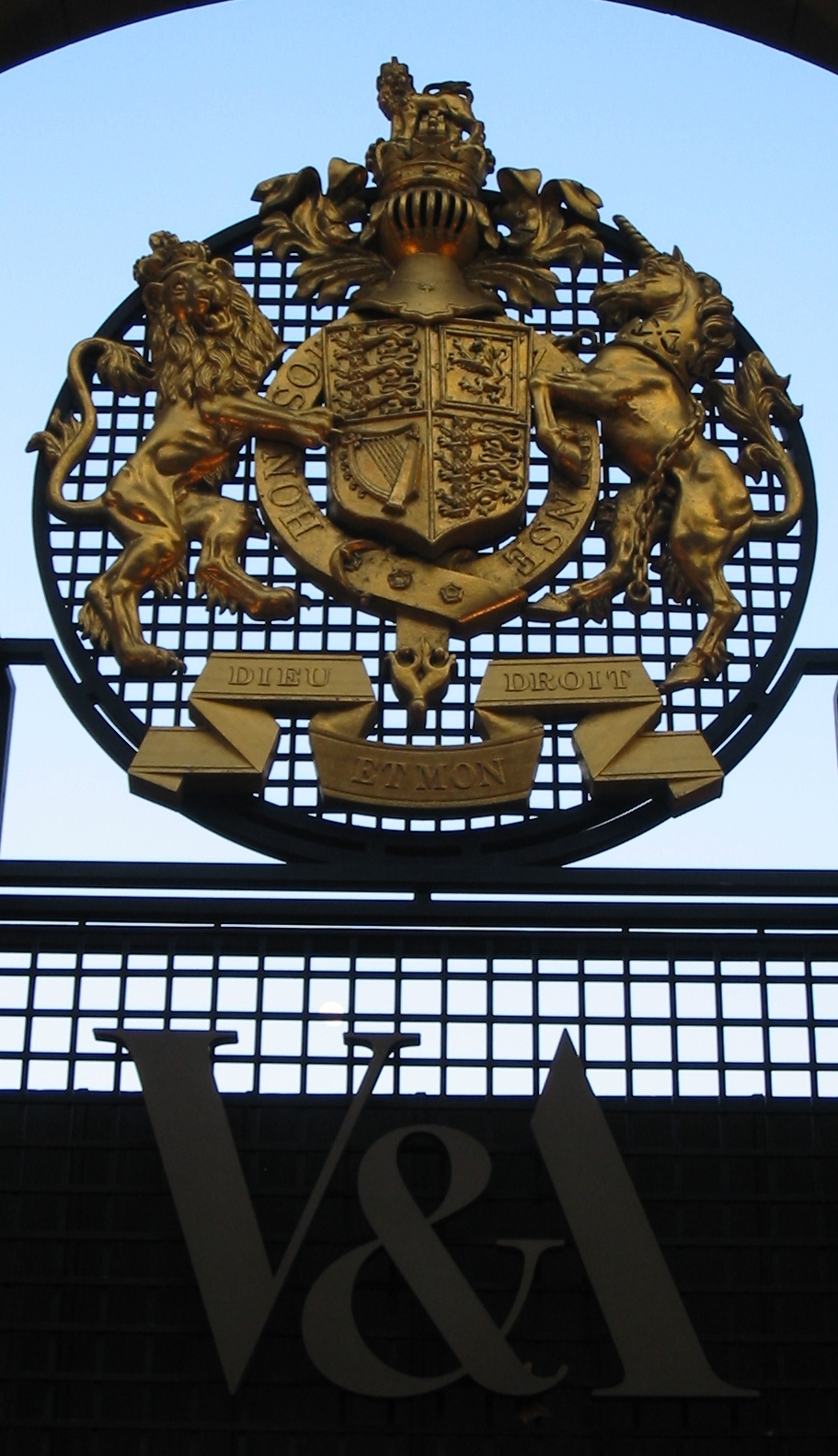 London